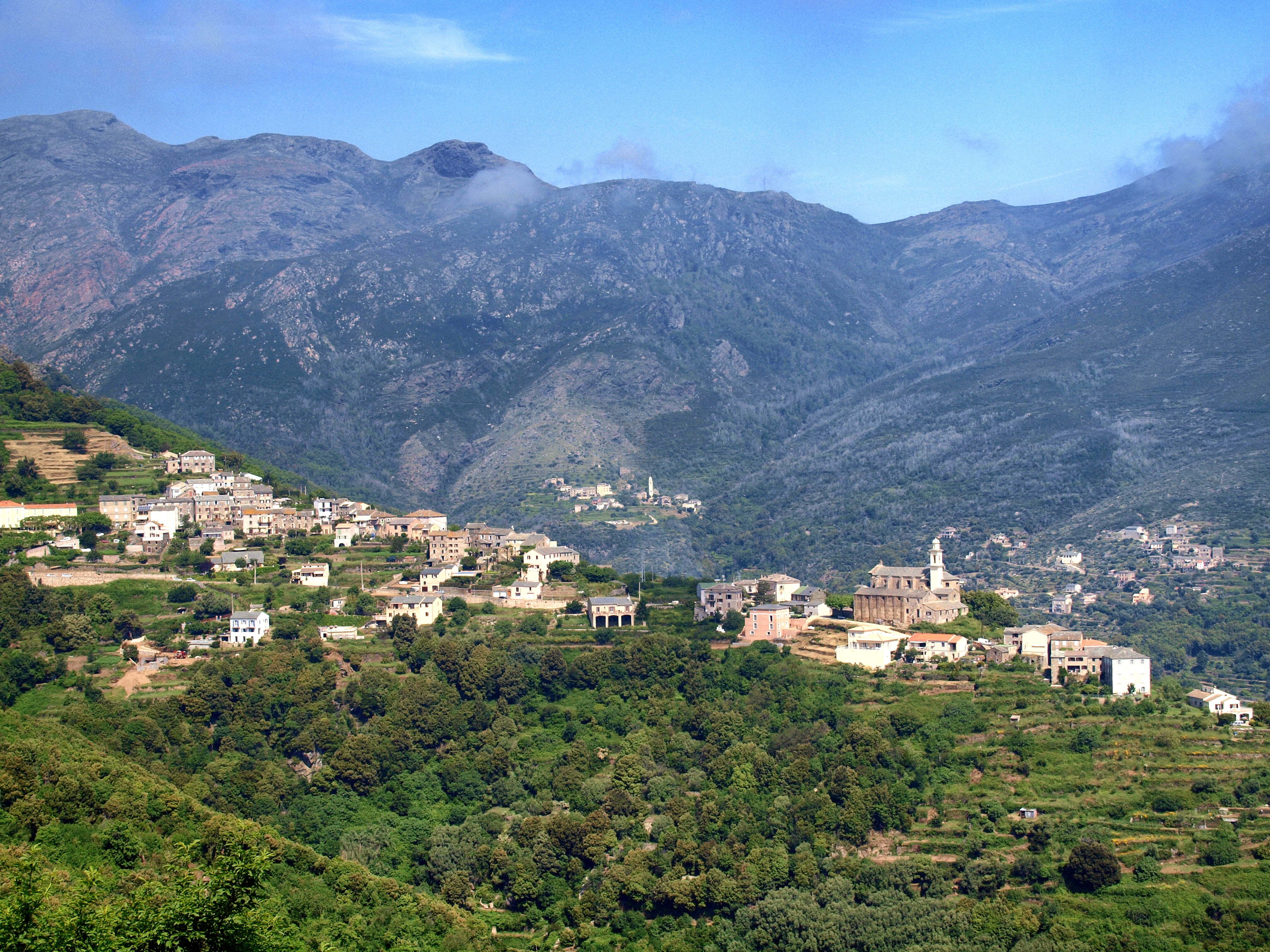 San-Martino-di-Lota, Cap Corse, (Corse) - Vue de San-Matino (Castagnetu à gauche et Acqualto à droite)